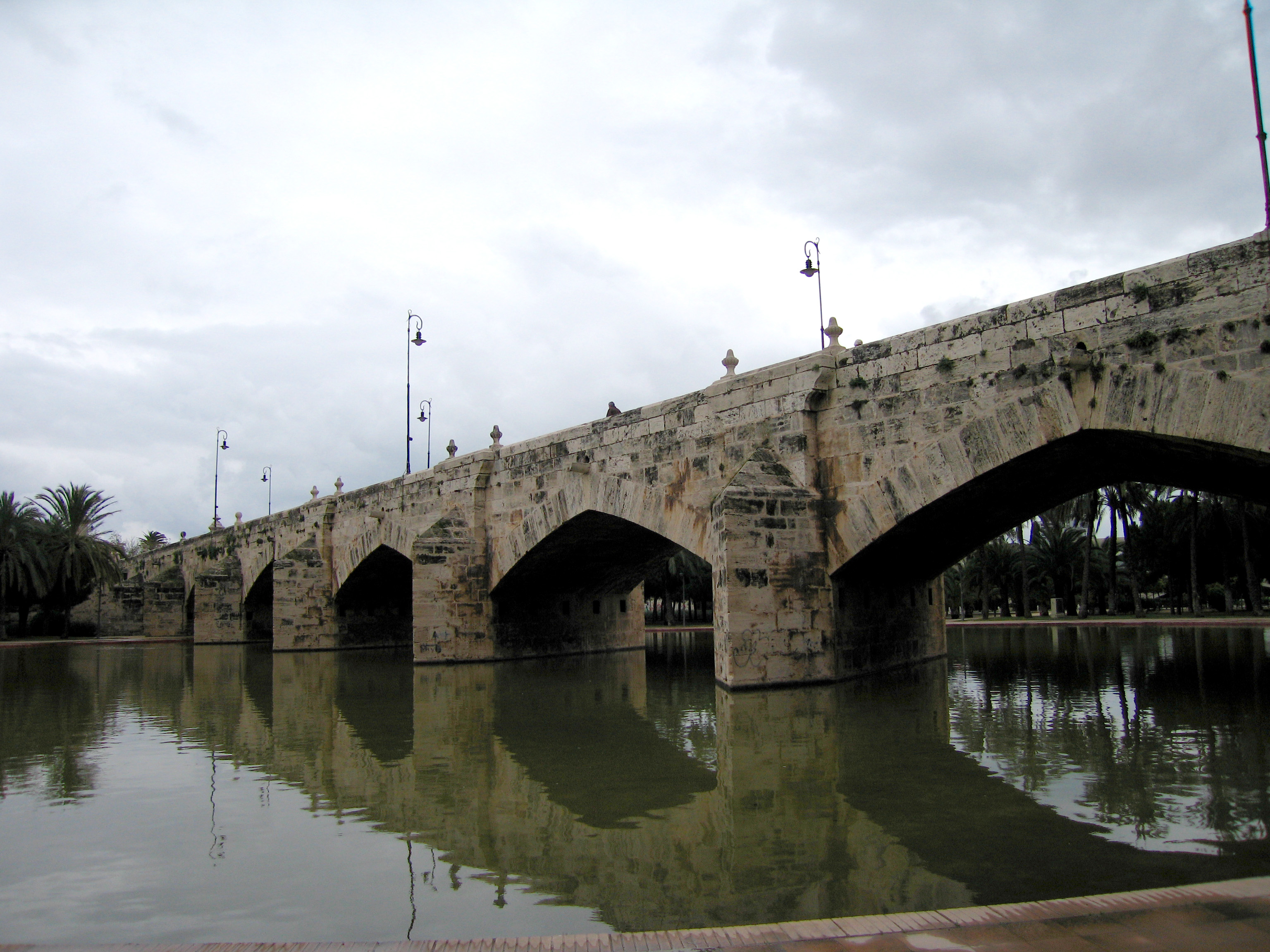 Pont de la Mar de València